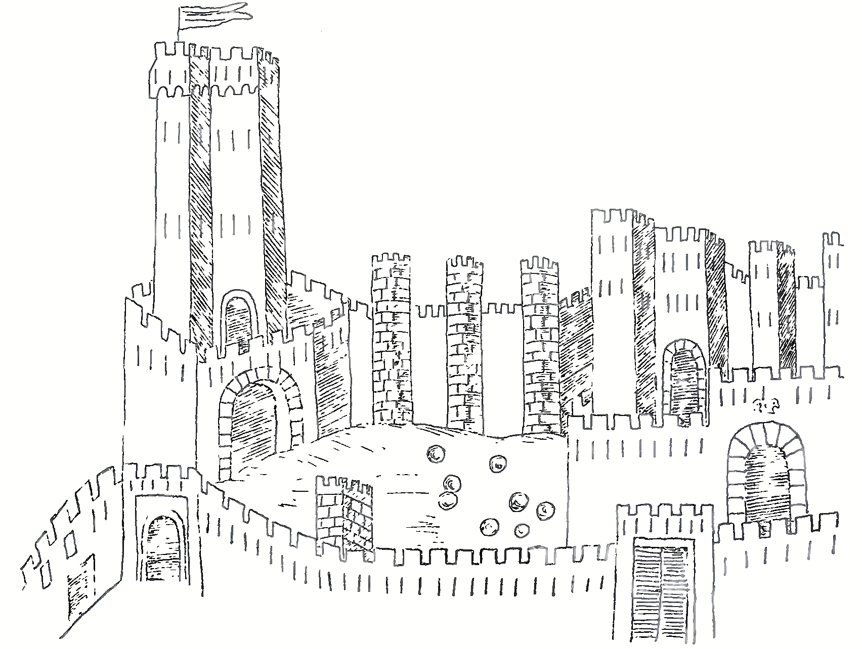 Cagliari XIV secolo, disegno archivio della Corona di Barcellona